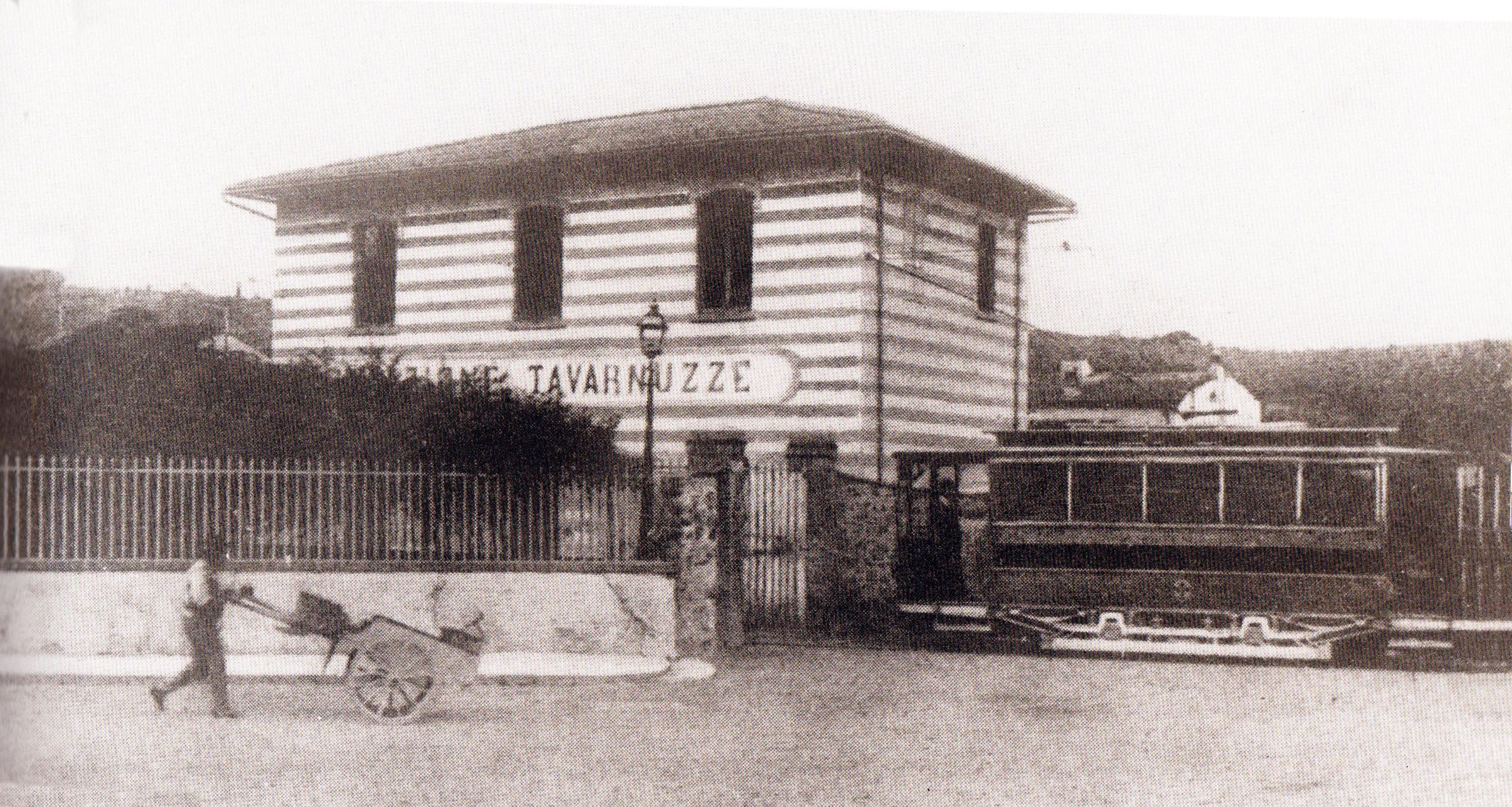 La stazione tranviaria di Tavarnuzze con un convoglio a trazione elettrica in sosta